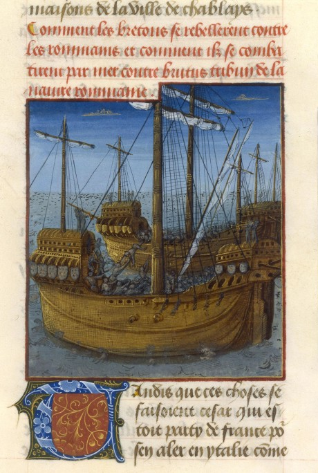 Enluminure du XVème Siècle, Bataille du Morbihan en 56 avant JC